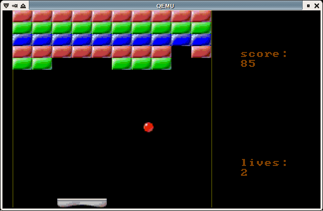 Yakanoid